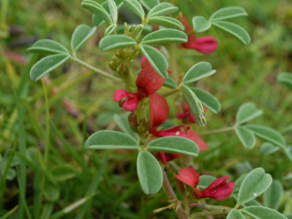 Indigofera trifoliata：ミツバコマツナギ 2008/08/12 沖縄本島北部：Okinawa Island, Japan